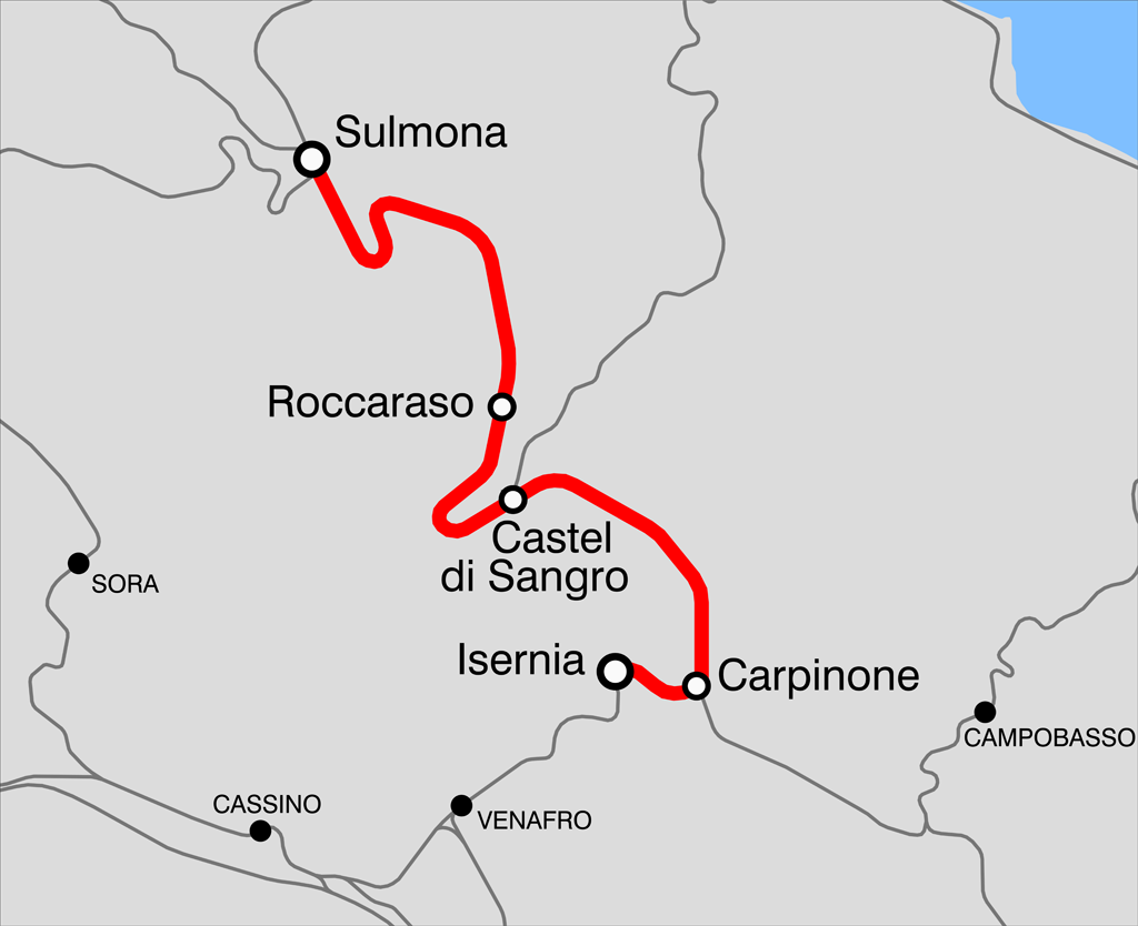 Mappa della ferrovia Sulmona-Isernia.